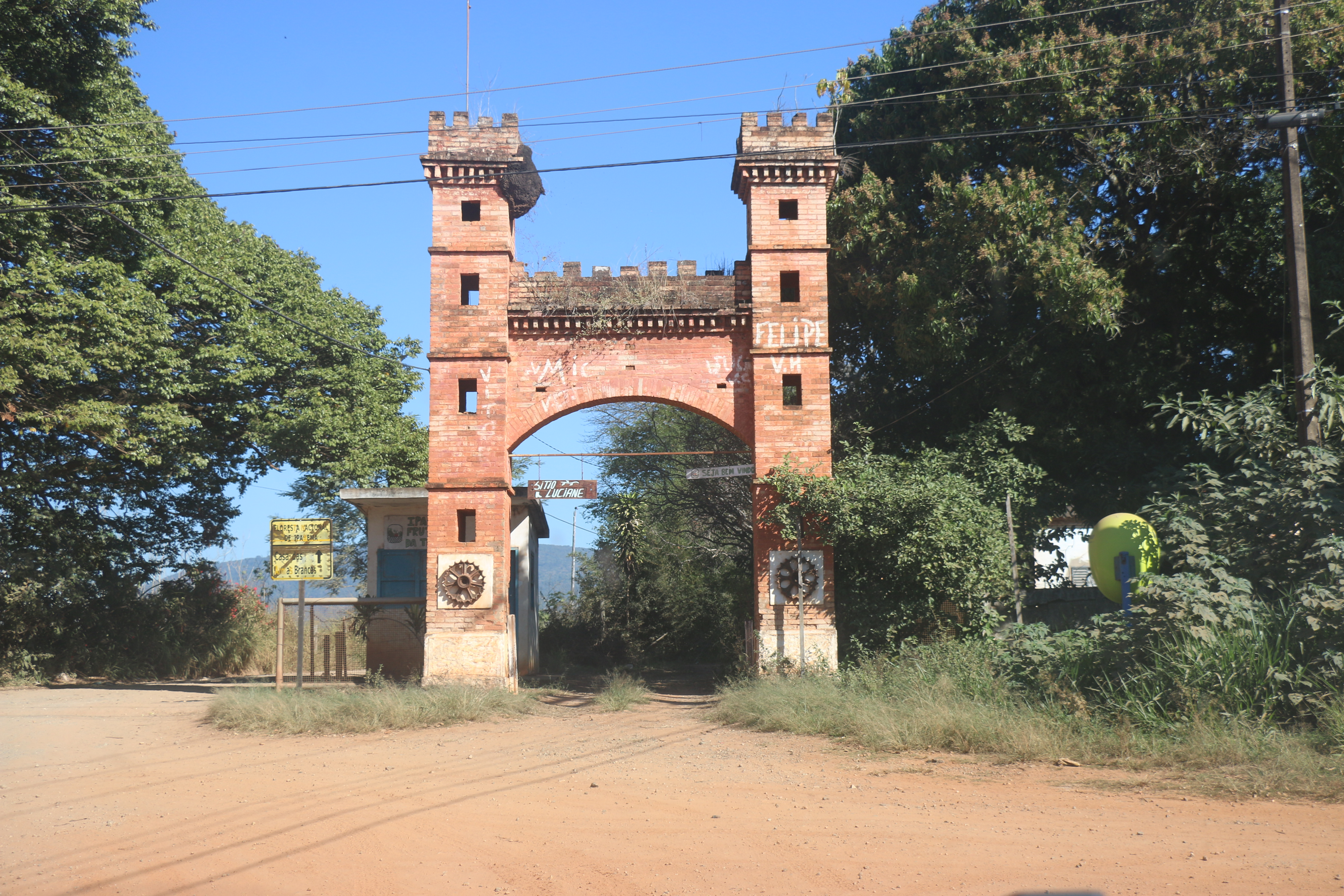 Área onde se encontram os remanescentes da Real Fábrica de Ferro de Ipanema